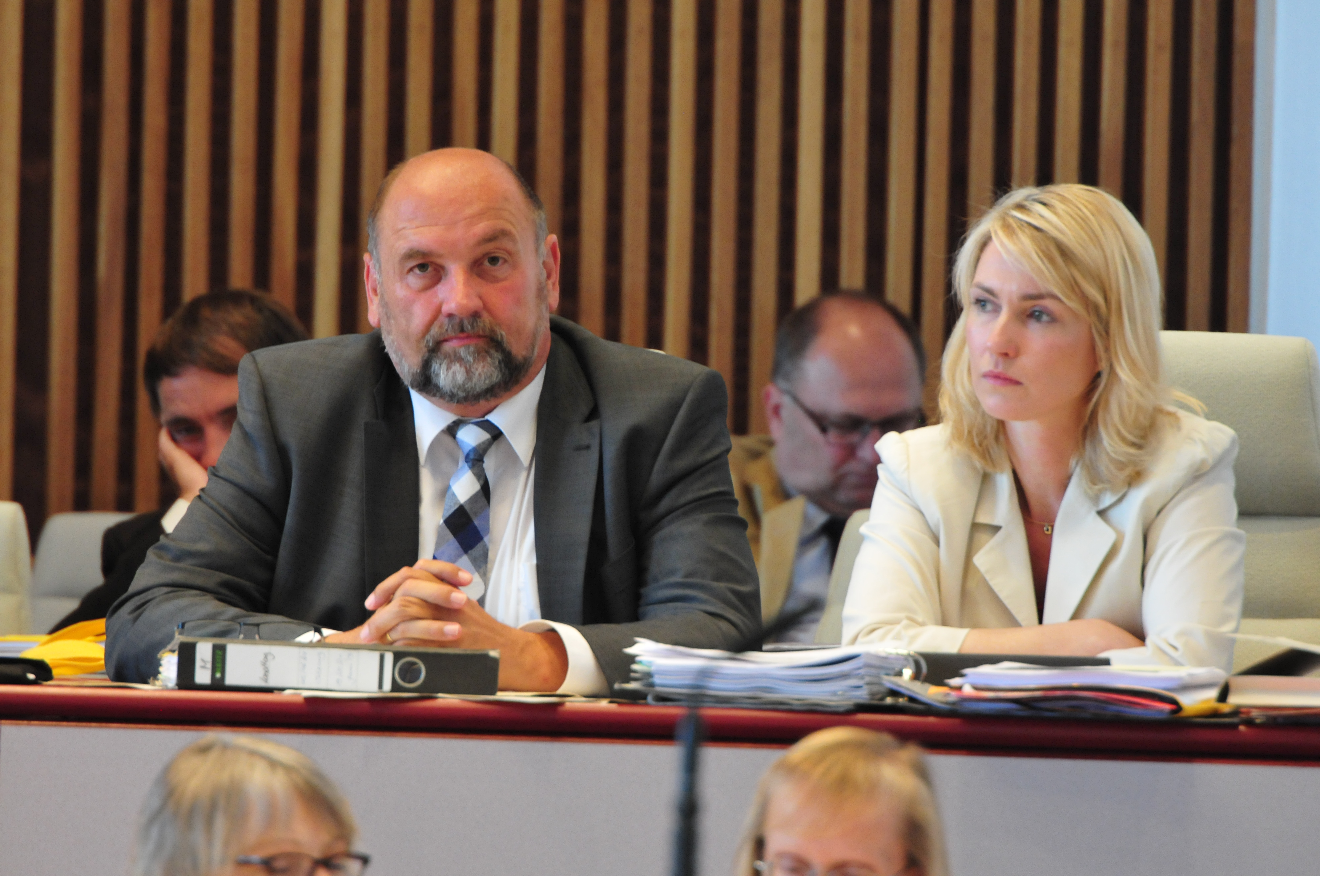 Landtagssitzung des Landtages von Mecklenburg-Vorpommern in Schwerin am 19. Juni 2013. In Bildmitte rechts Manuela Schwesig und links ?